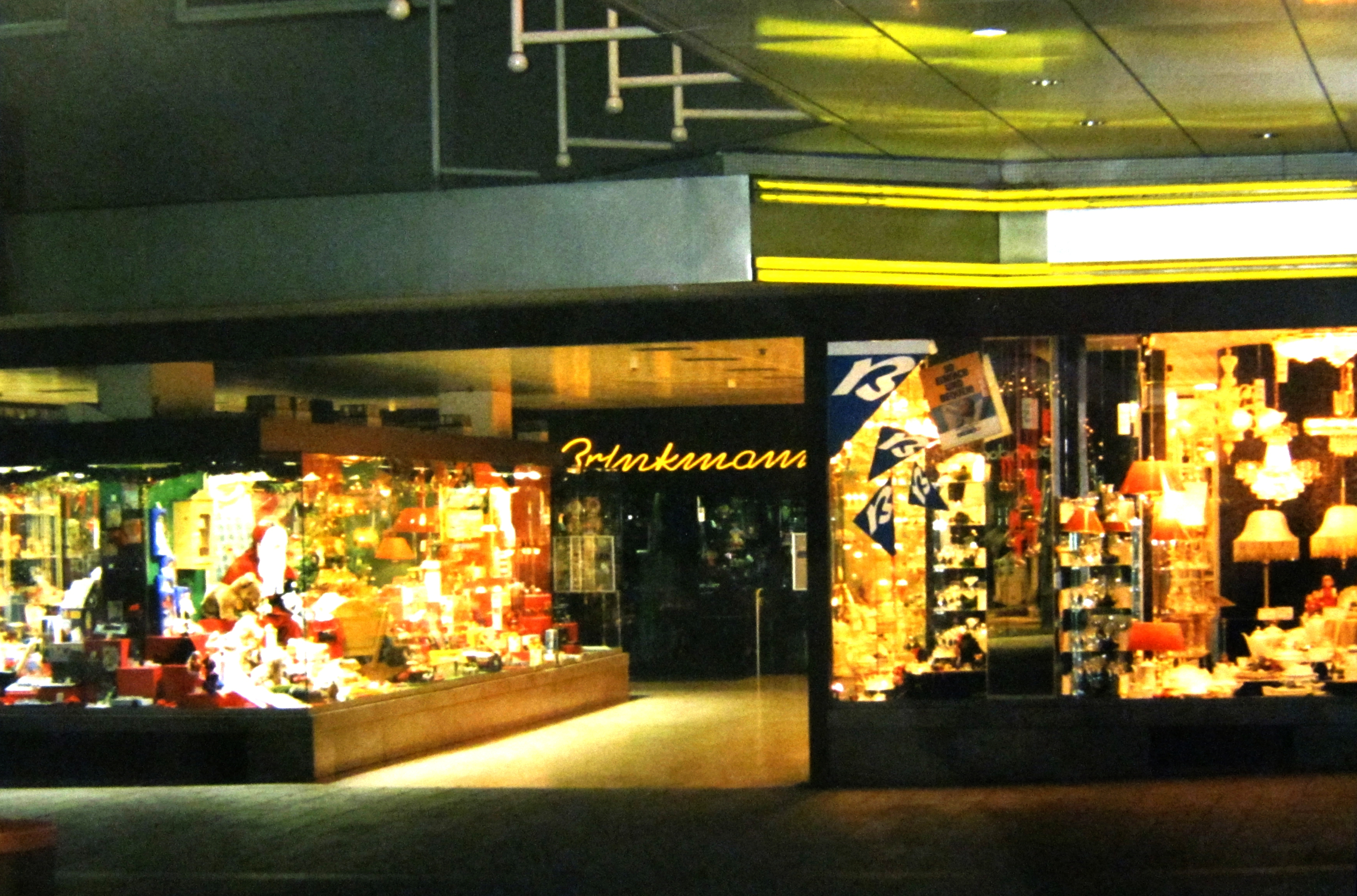 Nebeneingang von "Brinkmann" in der Spitalerstraße in Hamburg bei Nacht (1992)